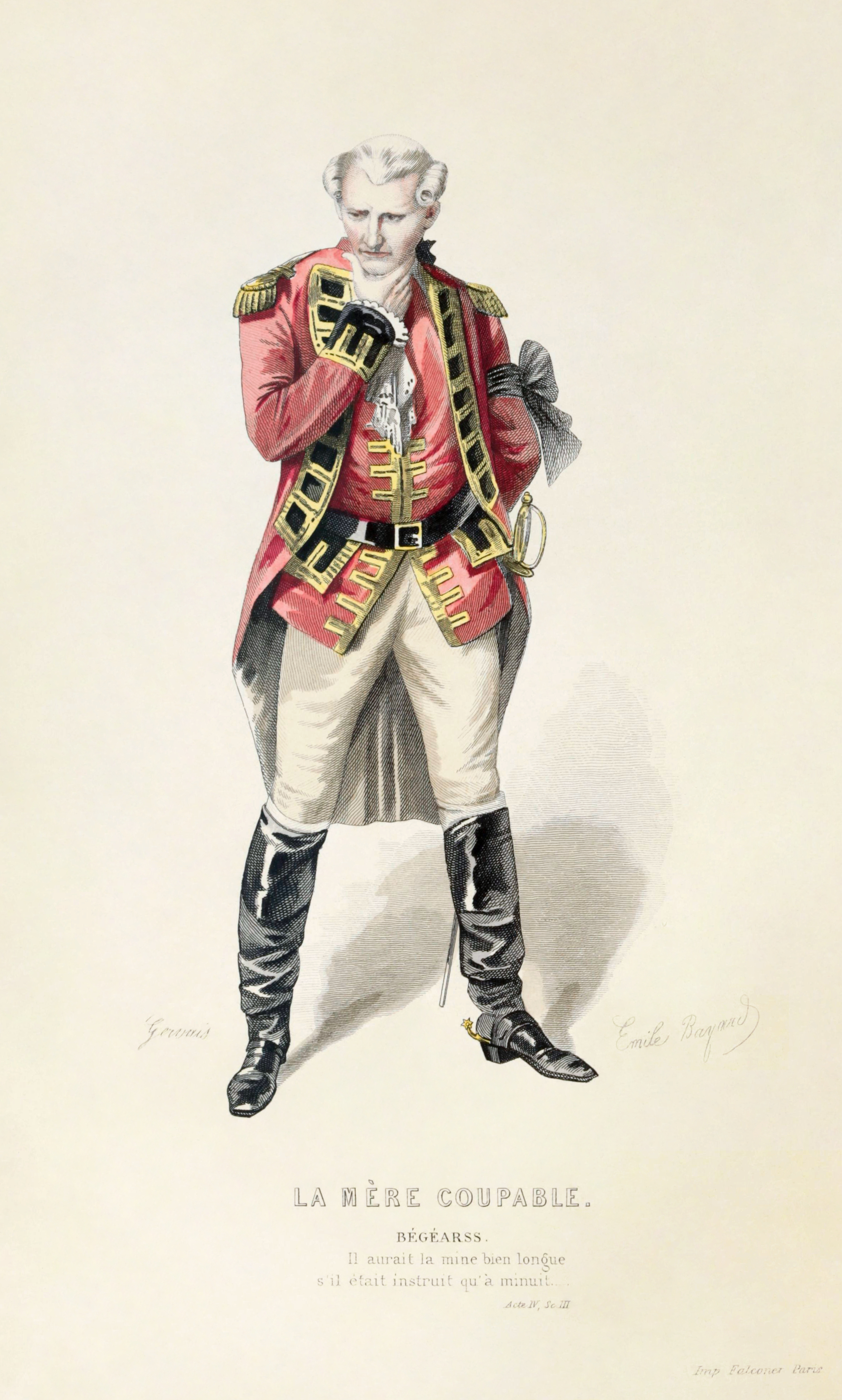 Émile Bayard (1837–1891): Bégearss. Illustration zu Pierre-Augustin Caron de Beaumarchais (1732–1799): La mère coupable (1792). Aus: Oeuvres complètes de Beaumarchais, hrsg. v. Édouard Fournier, Paris 1876, S. 186/187. Bibliothèque nationale de France.